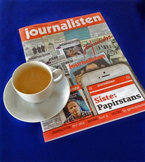 Bladet Journalistens siste utgave på papir, desember 2014